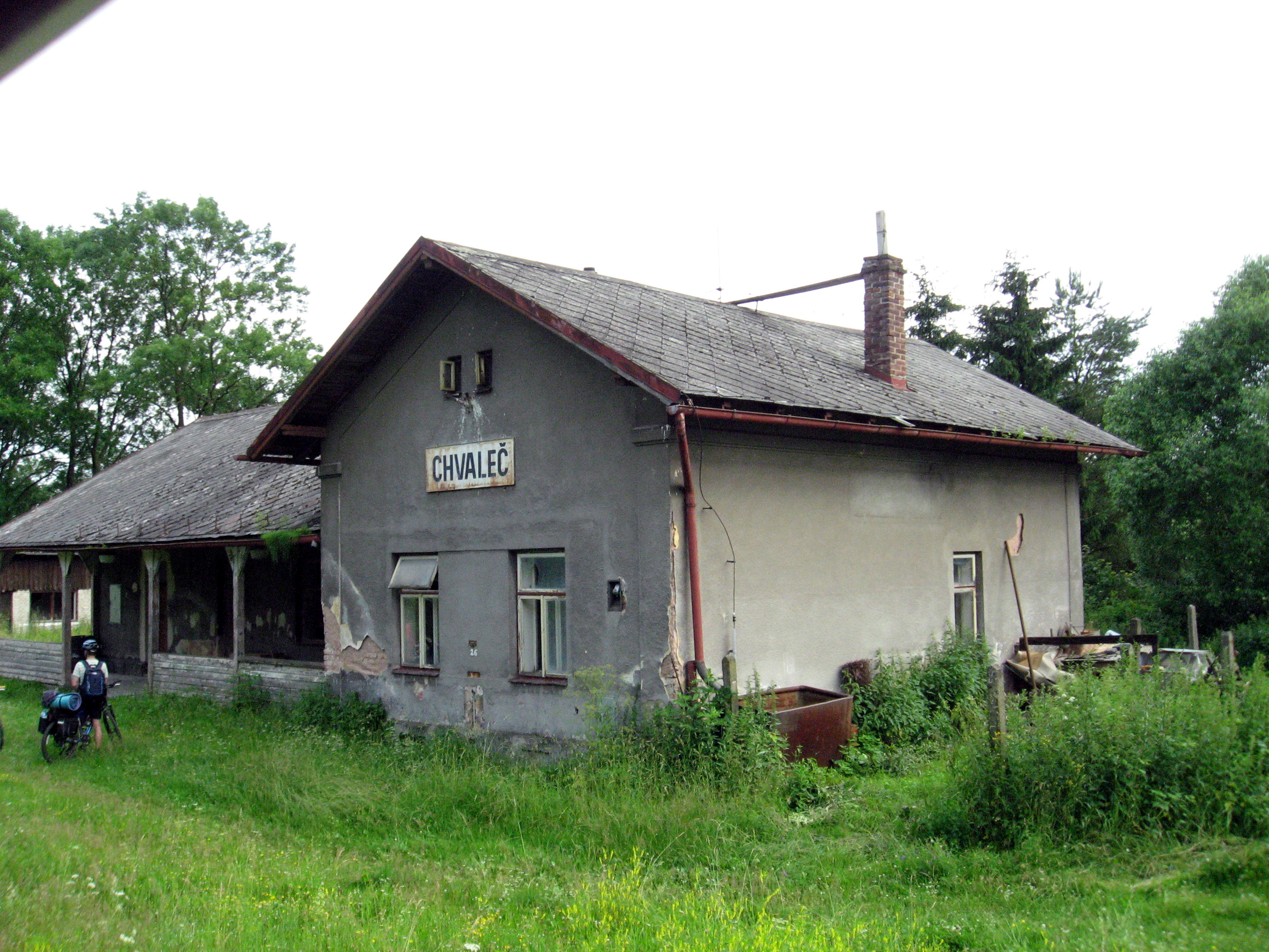 Chvaleč, železniční stanice